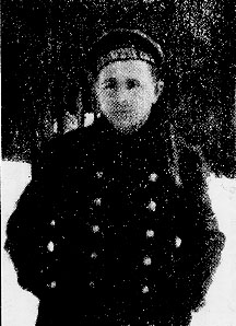 Fotografía de Stepán Maxímovich Petrichenko algunos meses después de su participación en la rebelión de Kronstadt.